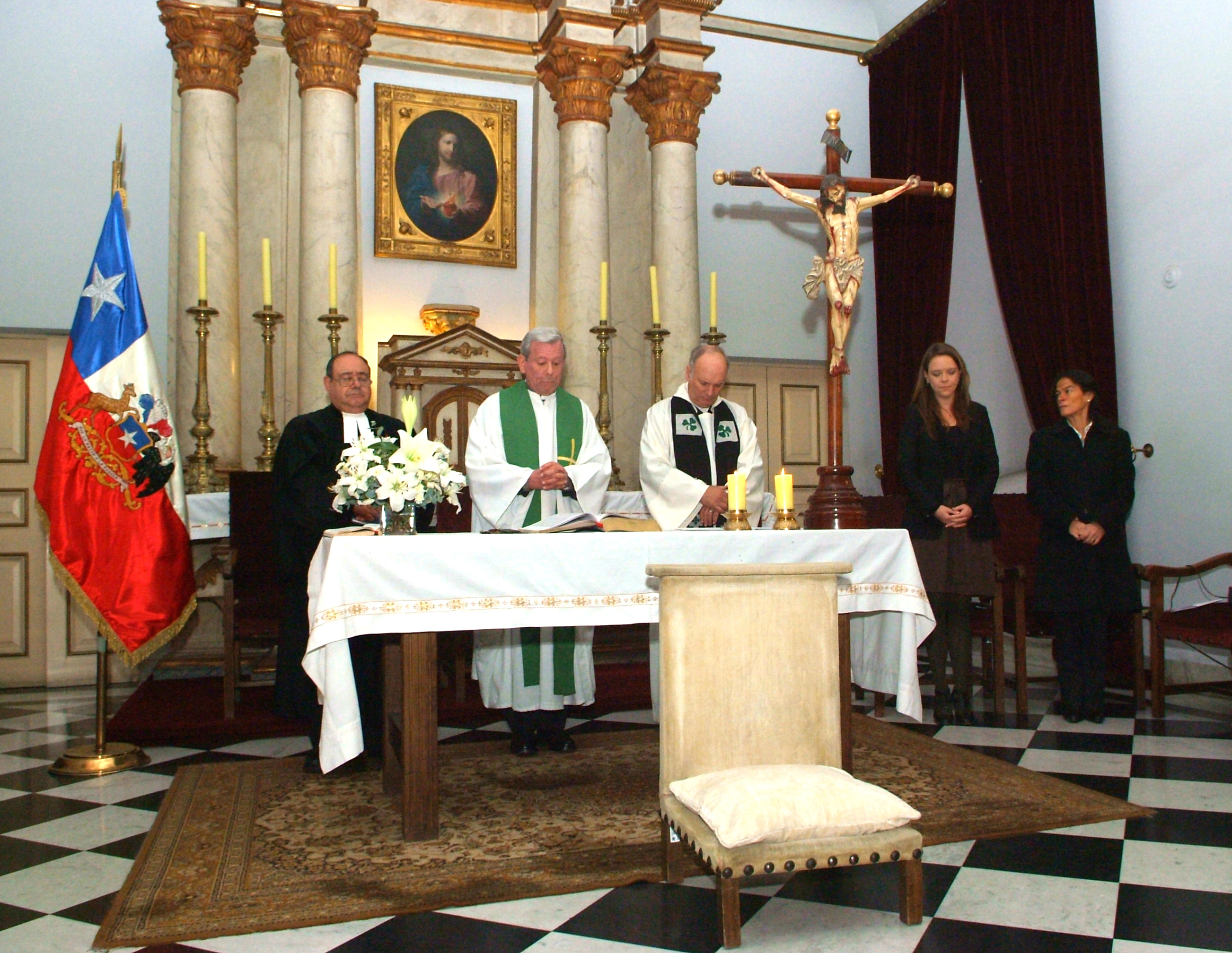 La Ministra Secretaria General de Gobierno, Ena von Baer y la Subsecretaria de la cartera, Mª Eugenia de la Fuente, participan en culto ecuménico con motivo de la celebración de los 78 años del Ministerio. Capilla Ecuménica, Palacio de La Moneda.